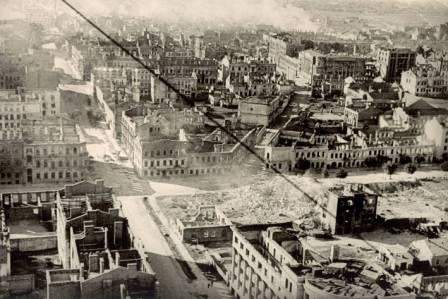 Перекрёсток Володорского и Маркса после войны